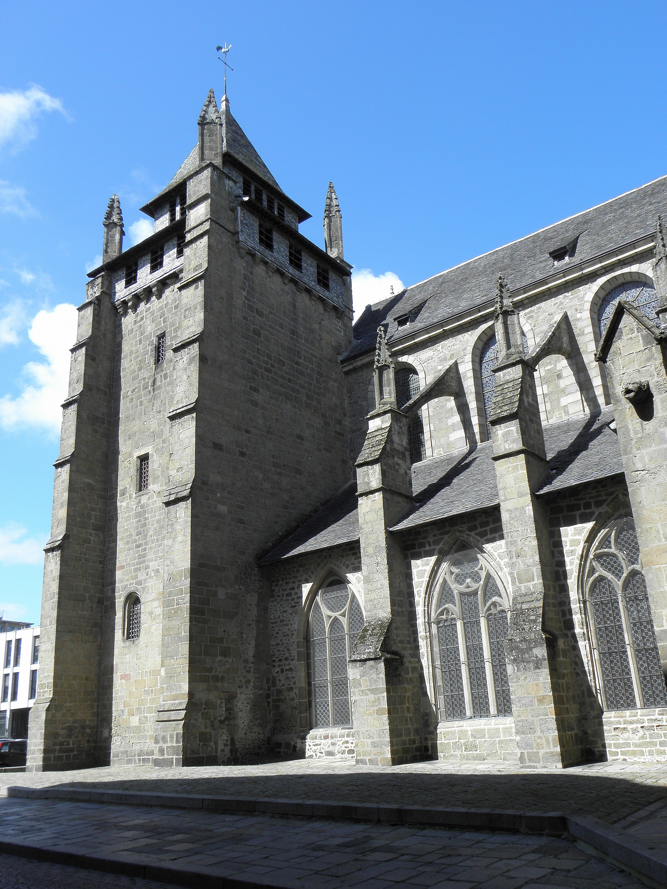 Tour Marie et flanc sud de la nef de la cathédrale Saint-Étienne de Saint-Brieuc (22).